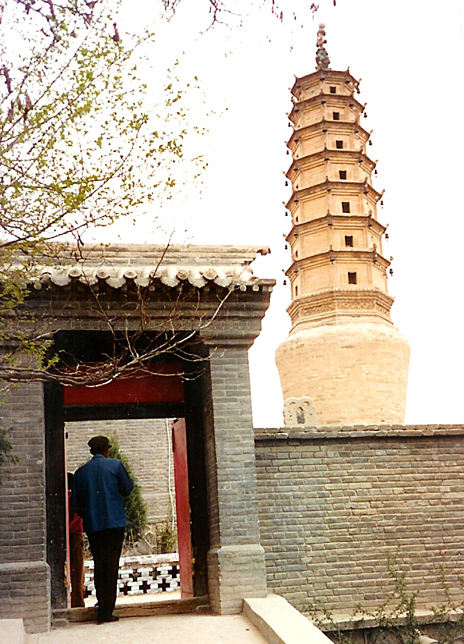 Wäiss Pagode vu Lanzhou